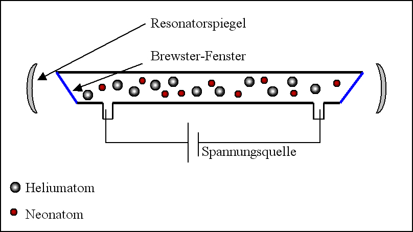 Schematische Darstellung eines Helium-Neon-Lasers